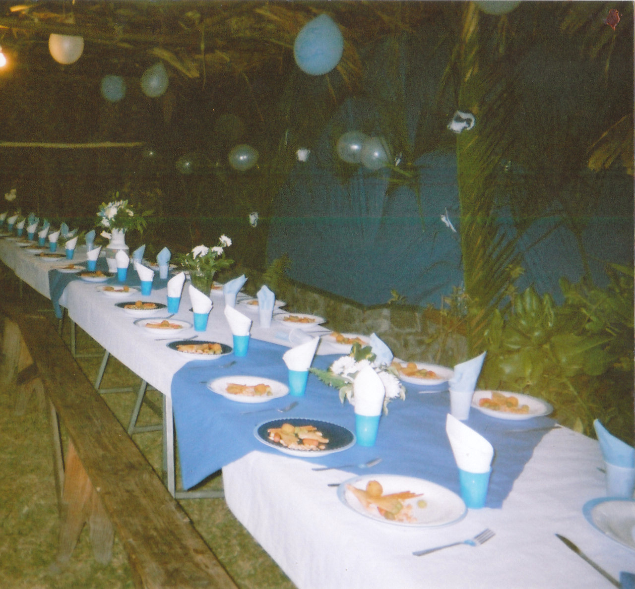 La structure est typique aux créoles. Elle est en bambou et garni de feuilles de cocotiers.